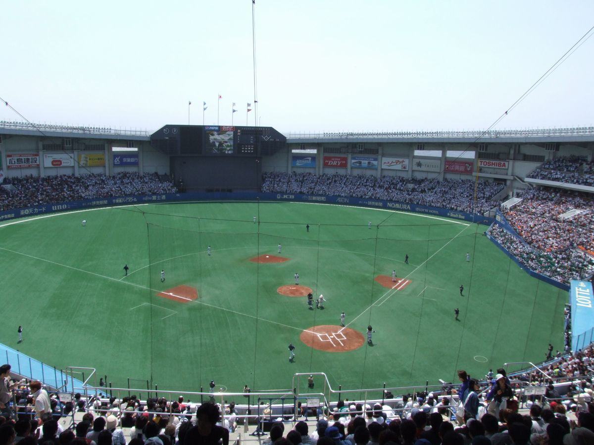 利用者:ROGによる撮影（2006年5月5日撮影） 2006年9月9日 (土) 17:54 . . ROG . . 1200×900 (145,930 バイト)